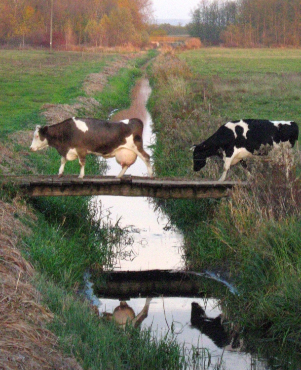 Csangota-ér Mórichidánál